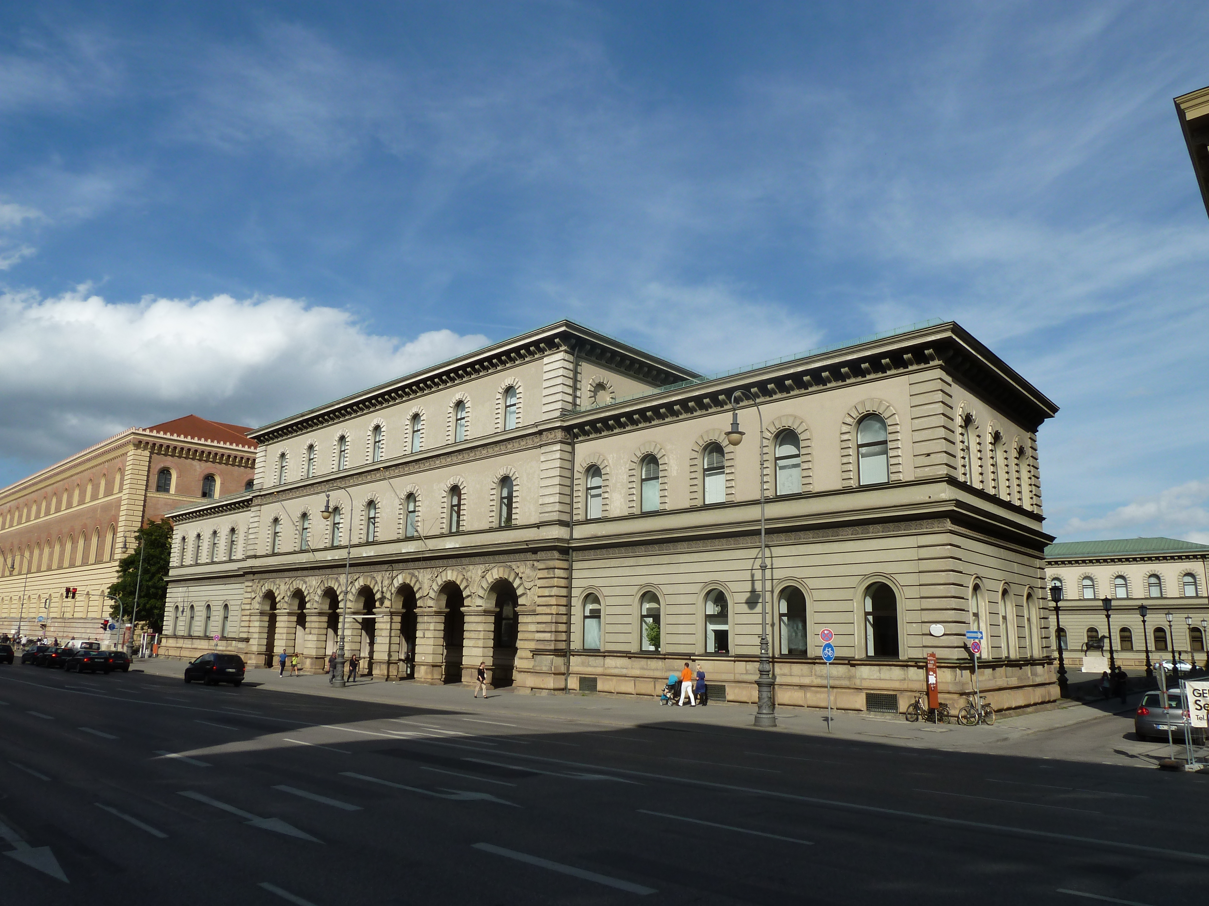 Ehemaliges Bayerisches Kriegsministerium München von süden